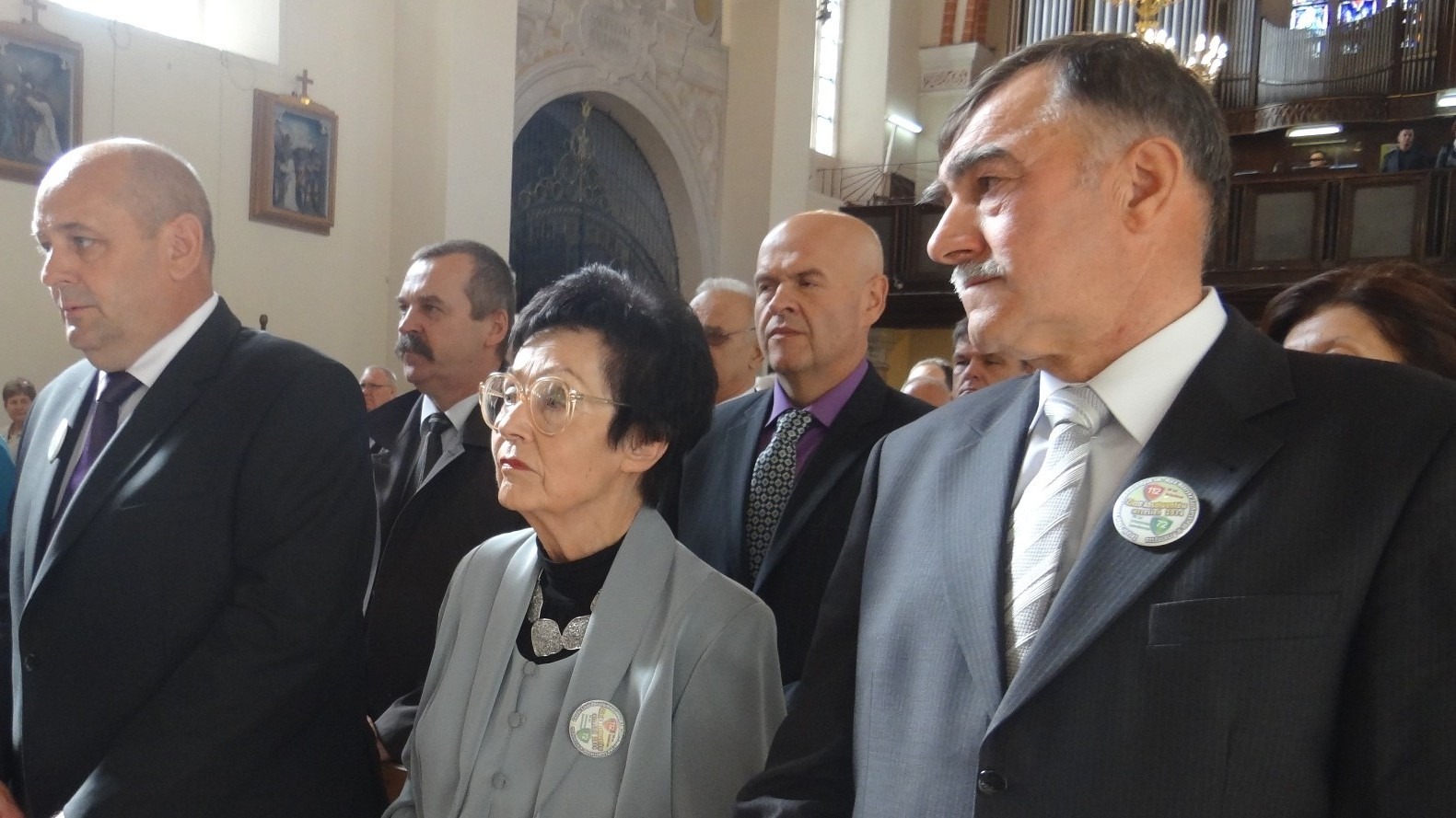 Dyrektor Rutkowska-Szwed